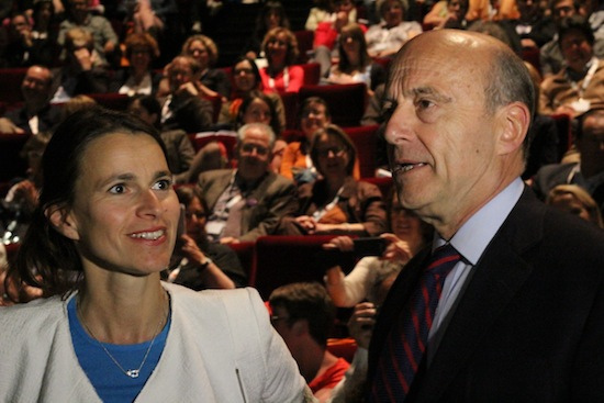 Aux Rencontres nationales de la librairie 2013, à Bordeaux